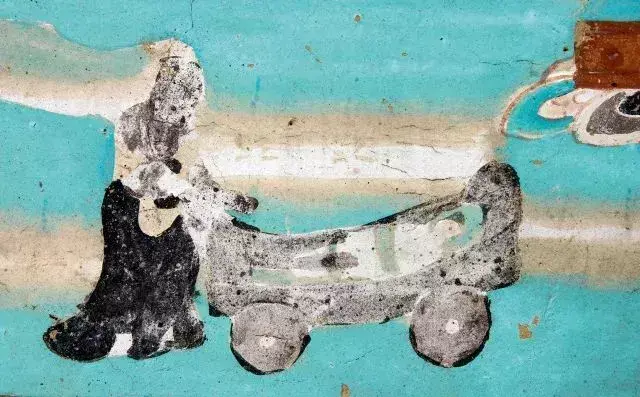 《报父母恩重经变》局部，敦煌莫高窟第156窟。